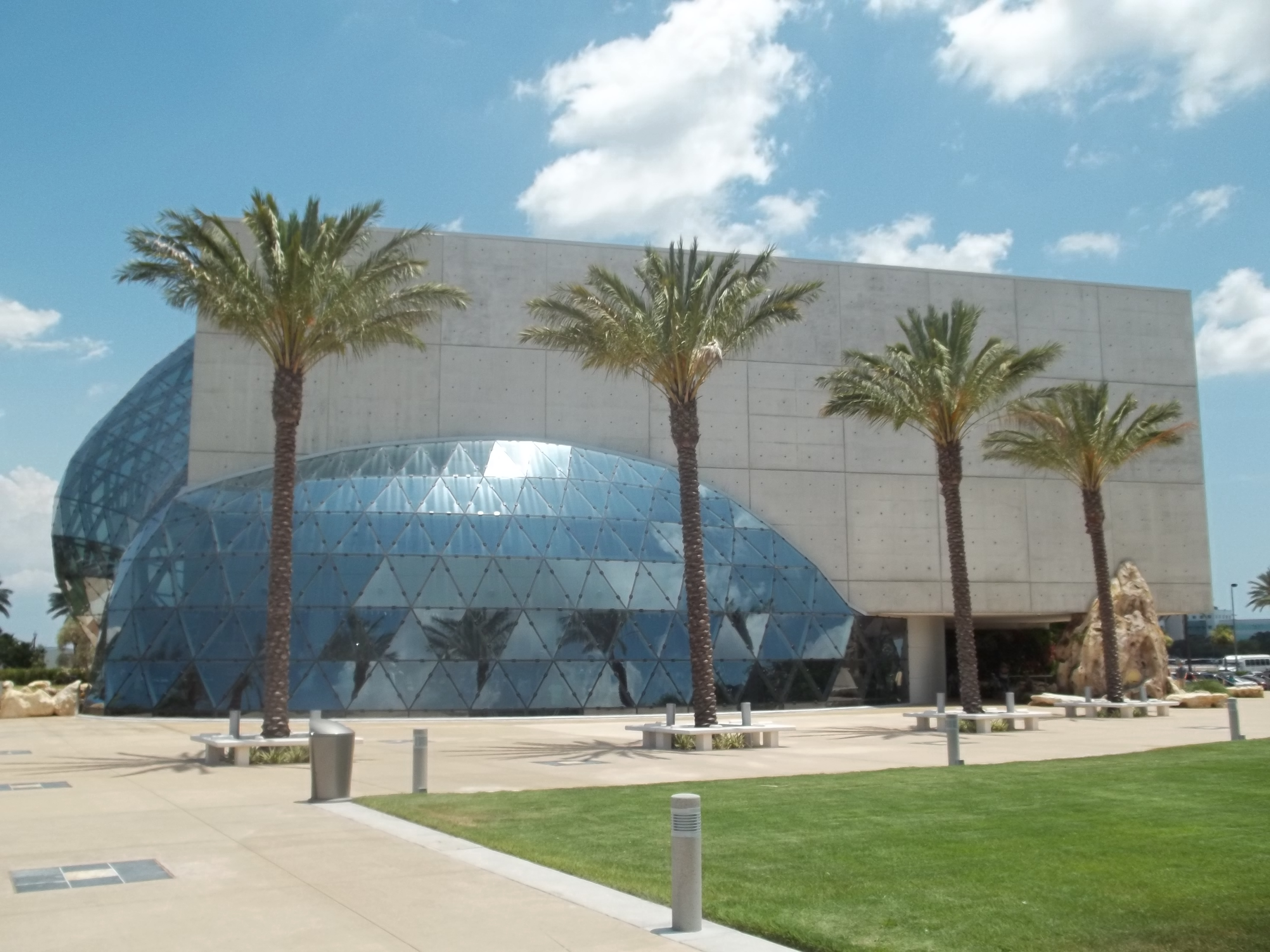 St. Petersburg, Florida: Salvador Dalí Museum